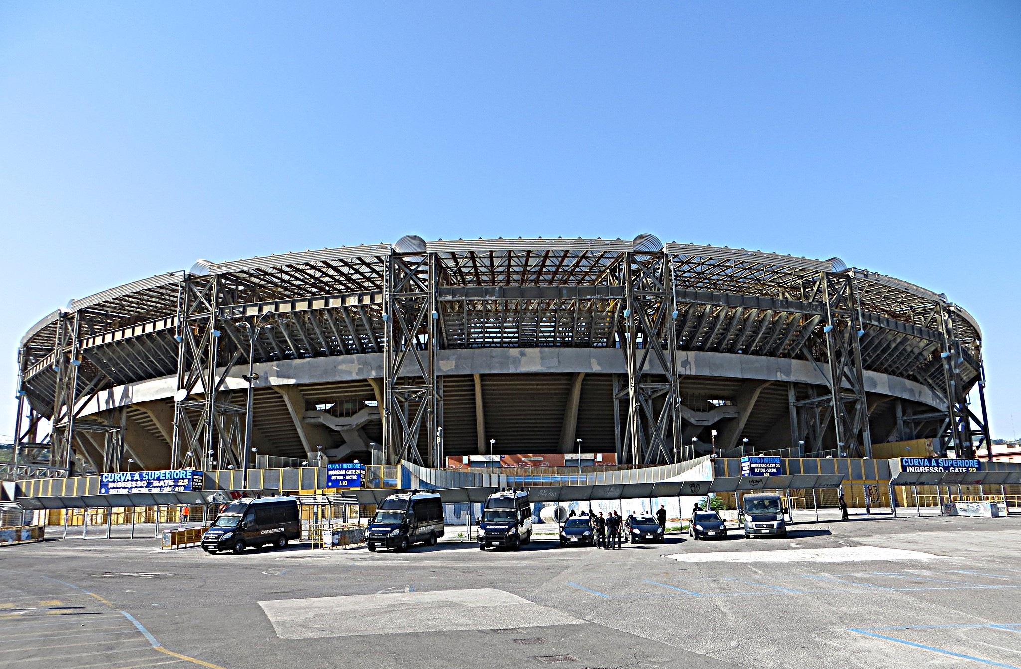 Stadio San Paolo